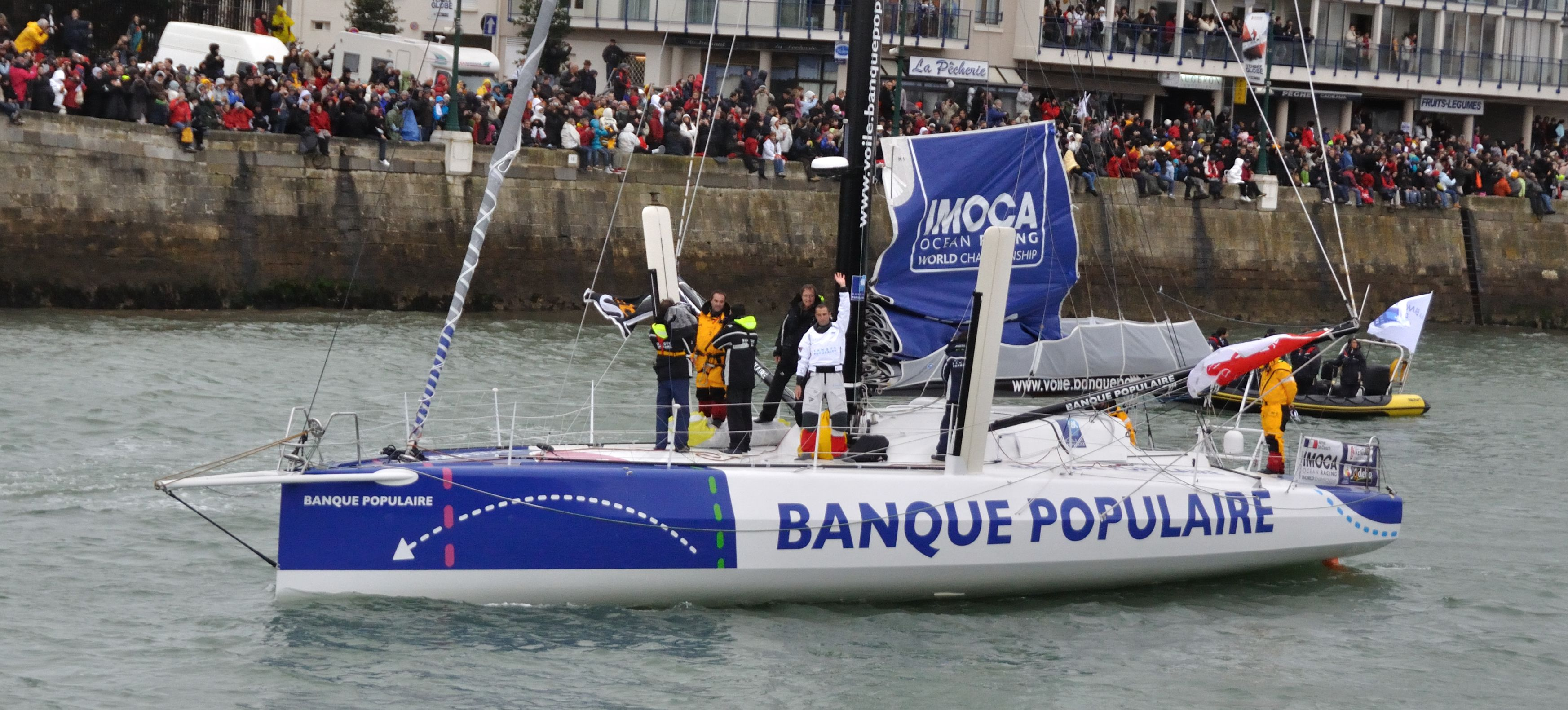 Vendée Globe 2012-2013 : Armel Le Cléac'h sur Banque populaire au départ des Sables d'Olonne